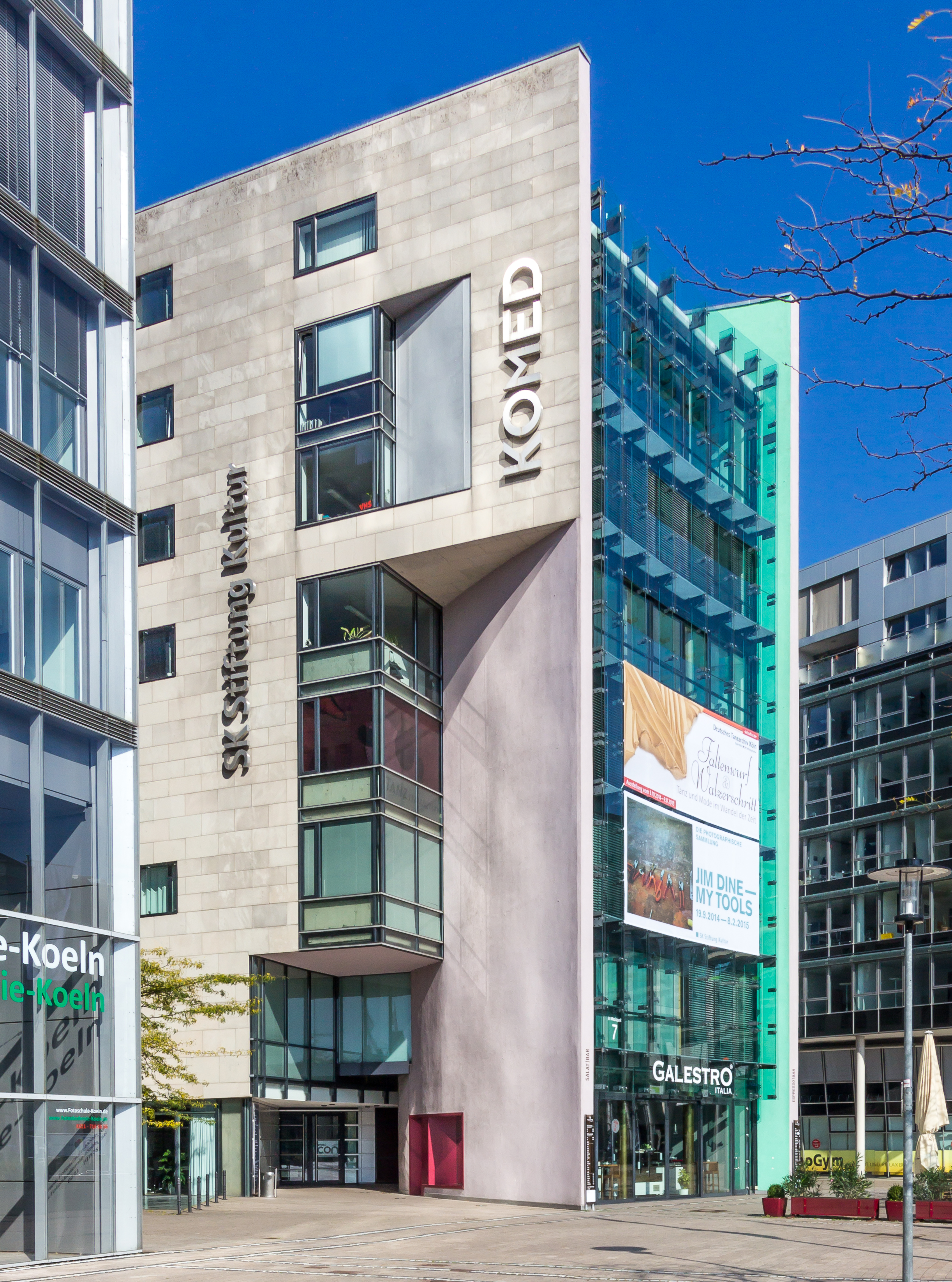 Komed, SK Stiftung Kultur, Mediapark 7, Köln